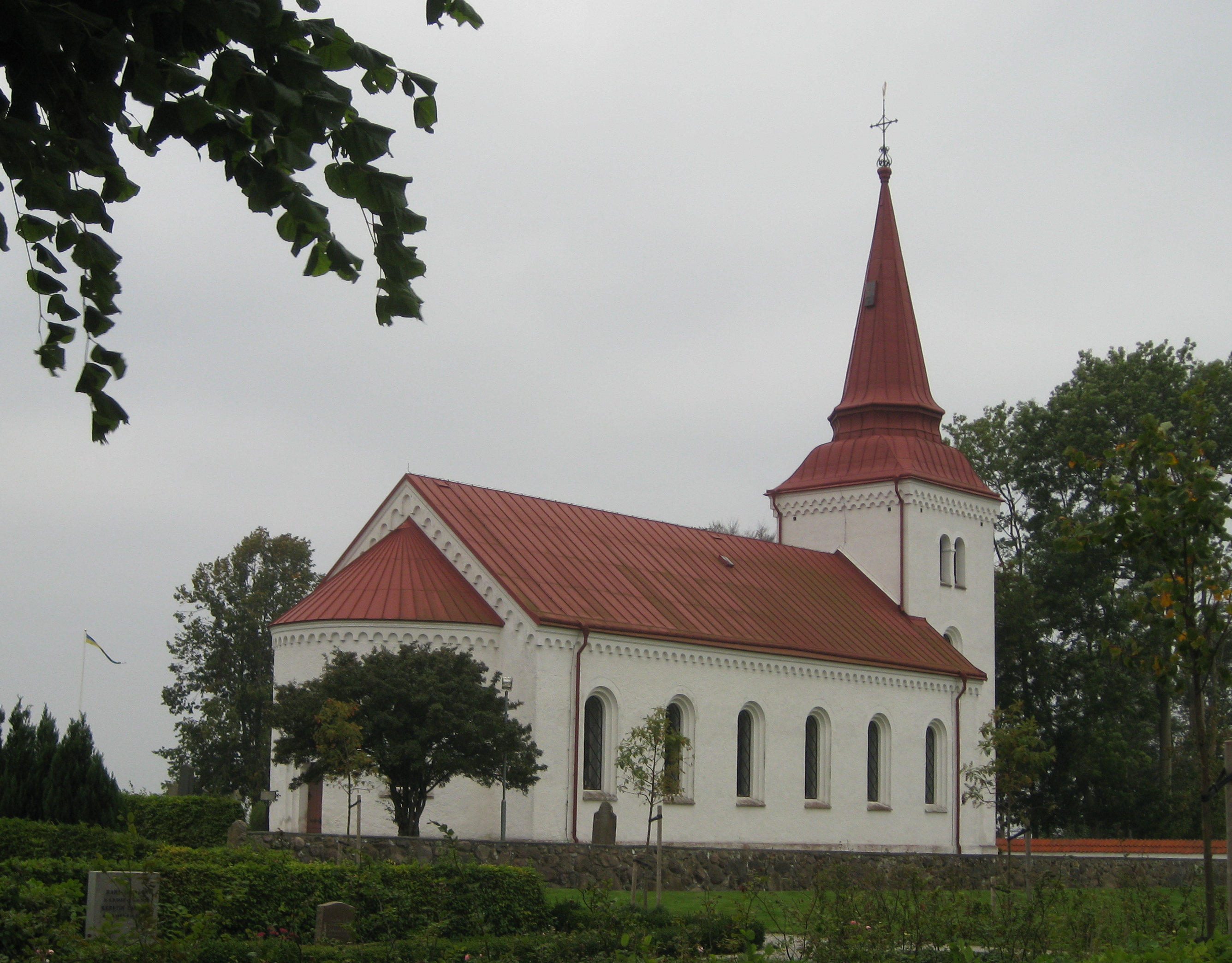 Östra Torps kyrka